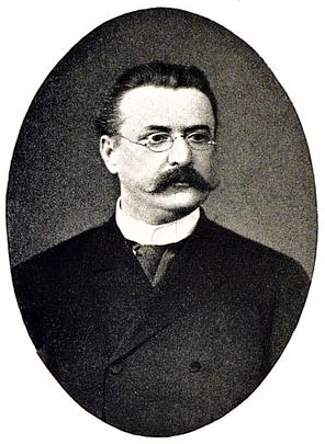 Anton Francevič Dobržinskij